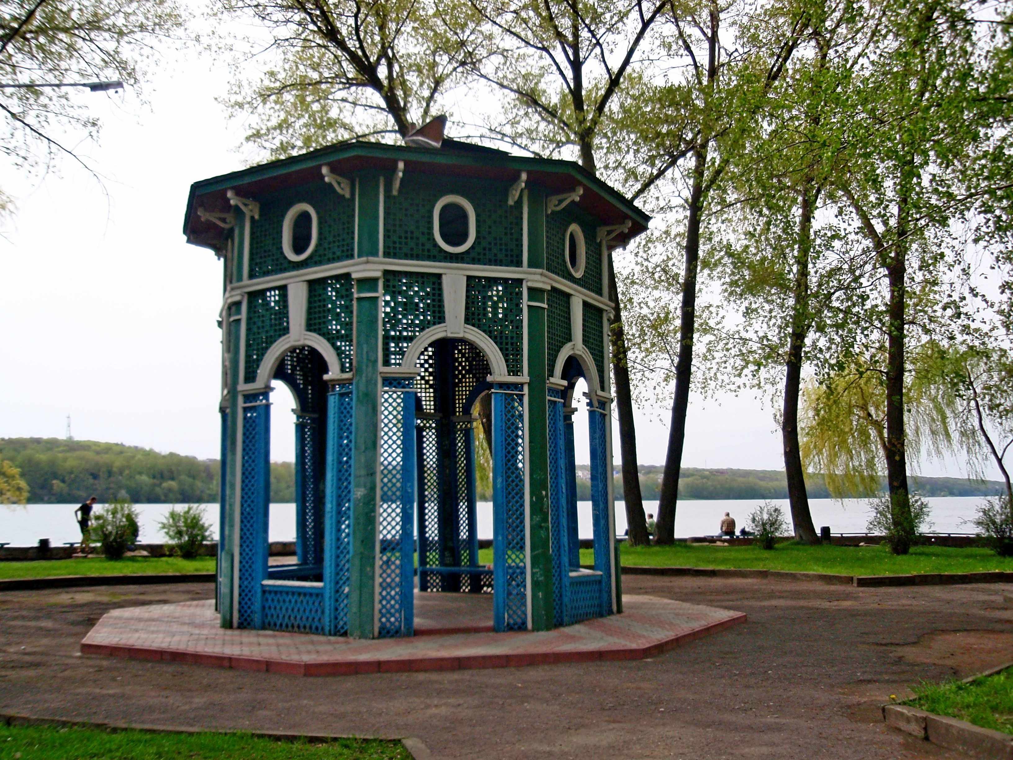 Альтанка на Острівку кохання в парку імені Тараса Шевченка, м. Тернопіль.